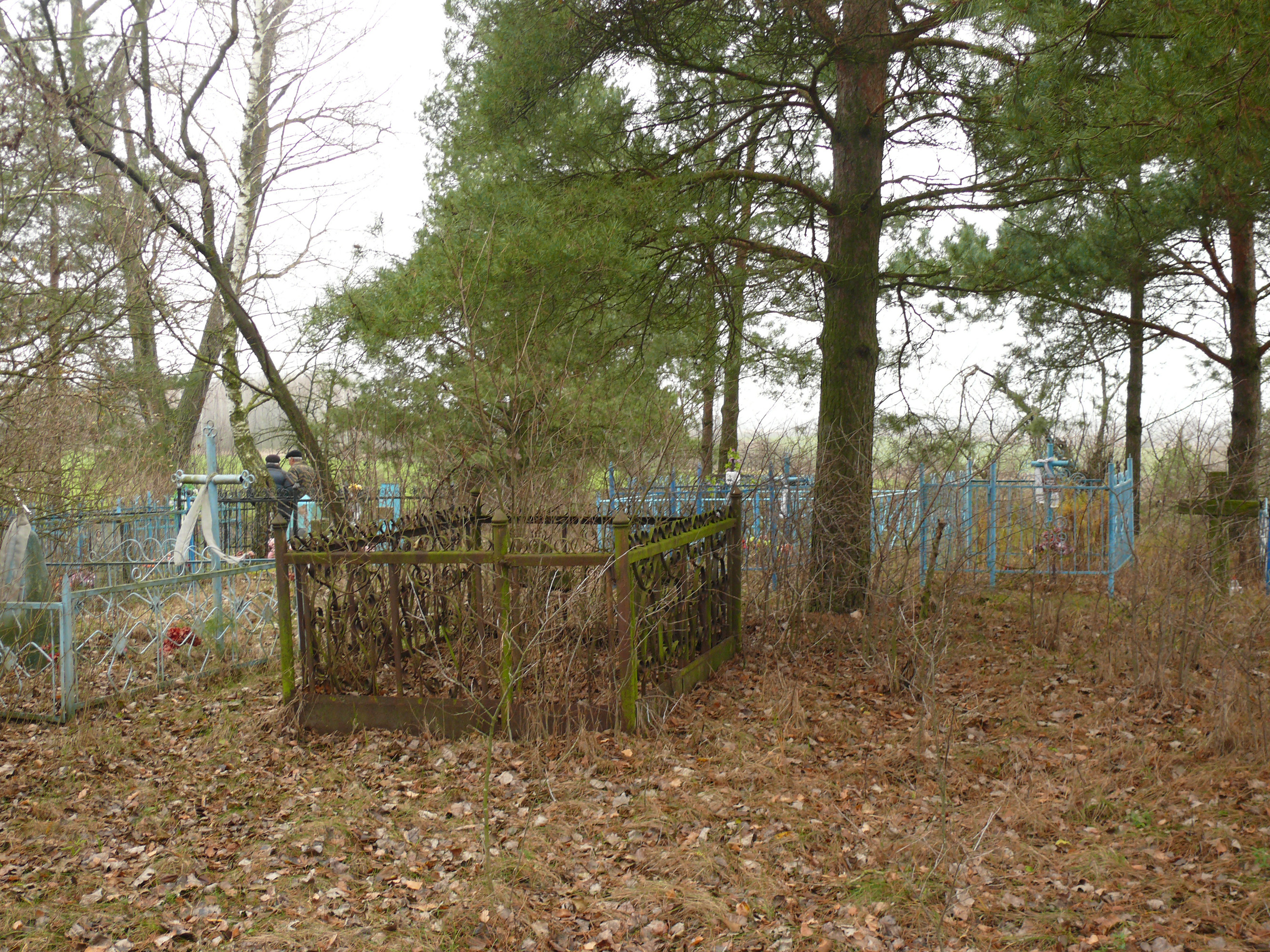 Кладбище Братского посёлка. Брагинский район Гомельской области, Белоруссия